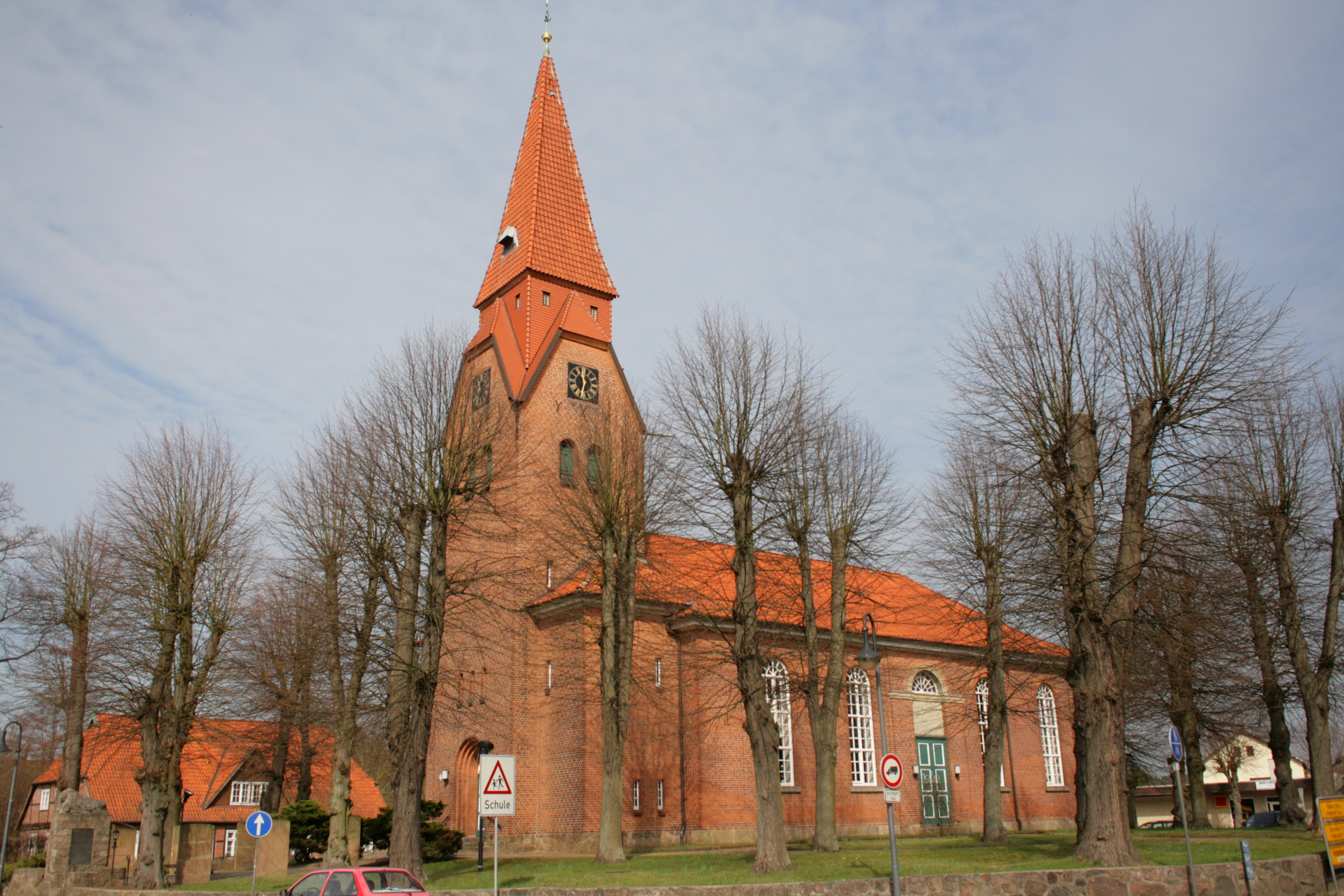 St.-Michaelis-Kirche im Dreieck Bahnhofstraße/Niendorfer Straße/Kirchplatz in Bienenbüttel